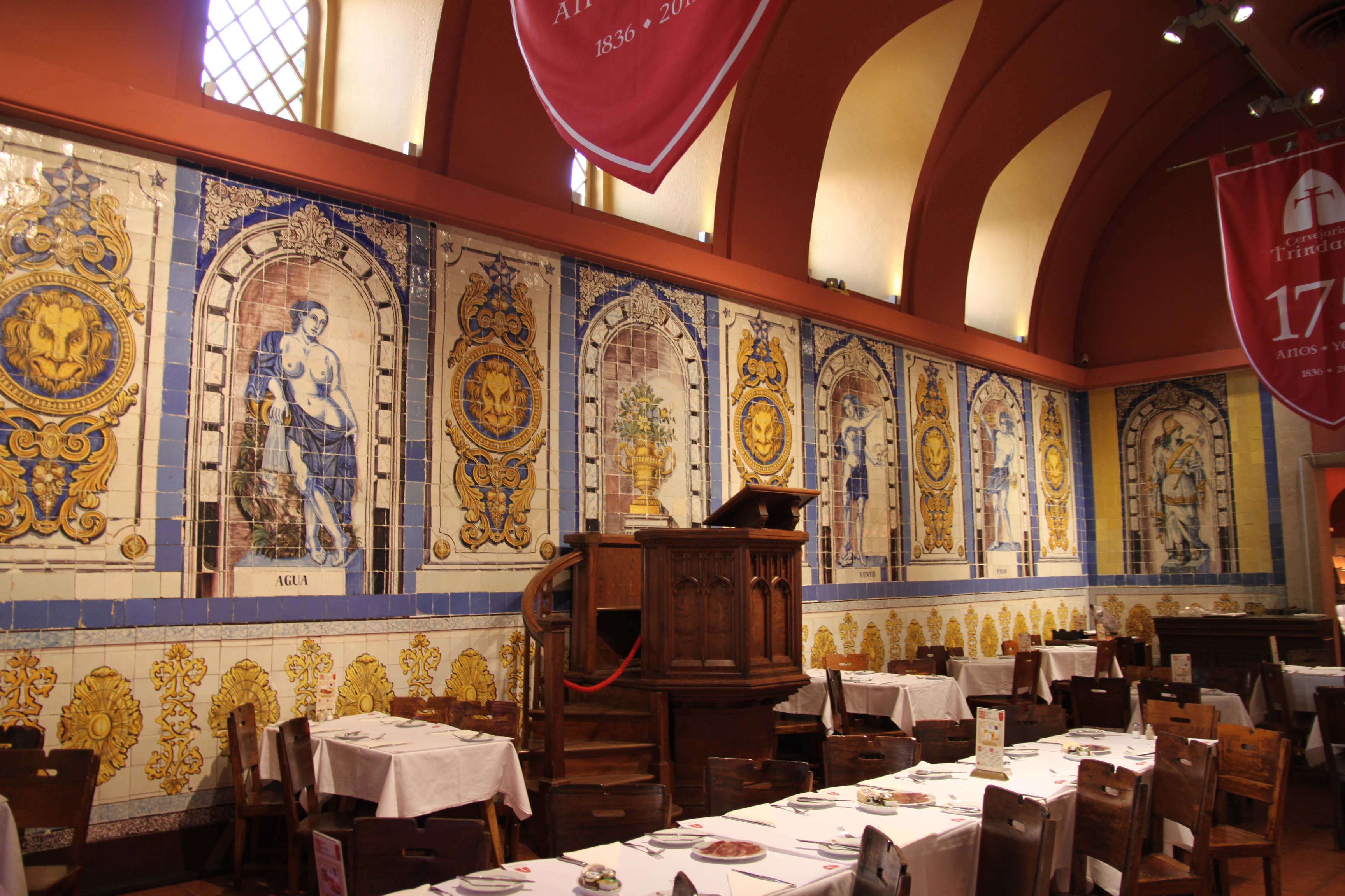 Edifício na Rua Nova da Trindade, n.º 20 This file was uploaded for Wiki Loves Monuments in Portugal with the unique identifier 97019784.